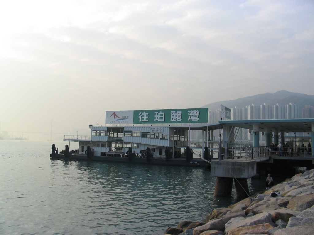 荃灣碼頭 Tsuen Wan Ferry Pier